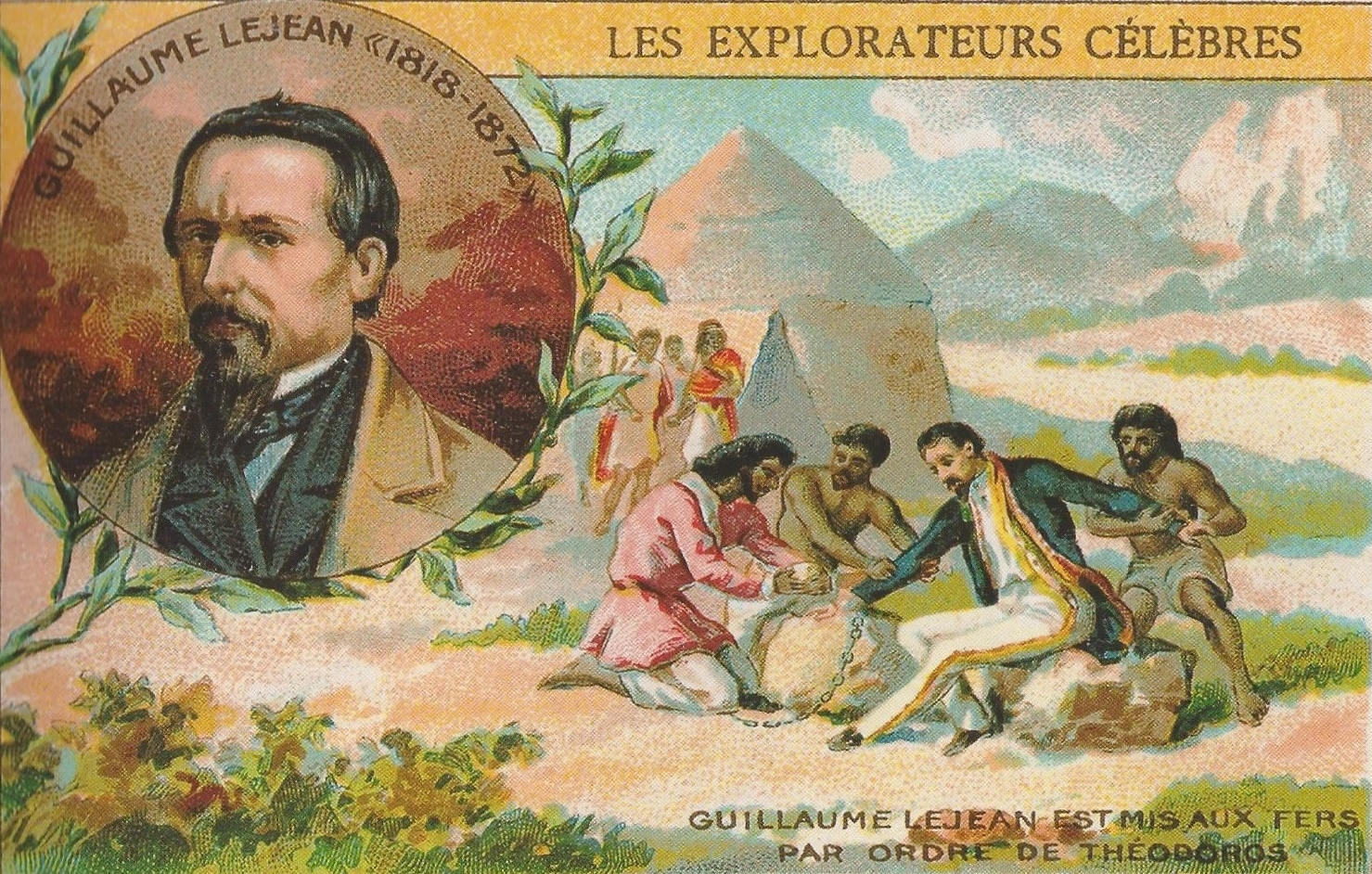 Image de la fin du XIXème siècle représentant le géographe et explorateur Guillaume Lejean